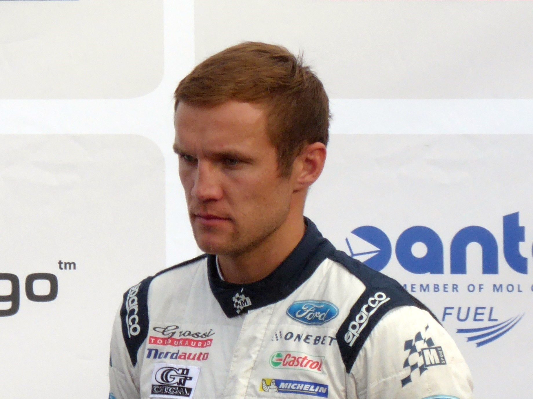 Martin Järveoja